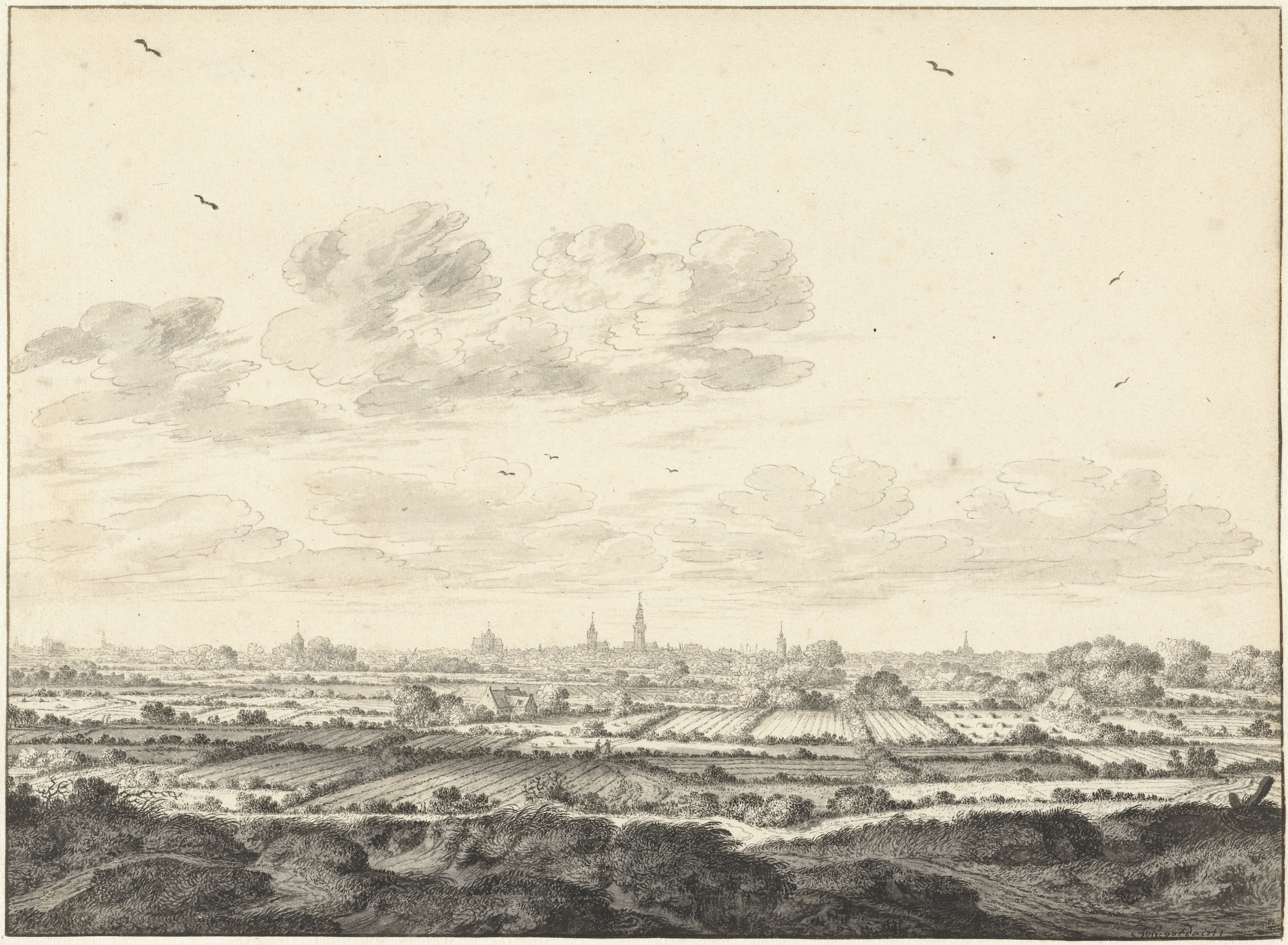 Gezicht op Middelburg, Johannes Goedaert, 1630 - 1668. pen in zwart, penseel in grijs, zwart krijt, hoogte 180 mm × breedte 245 mm